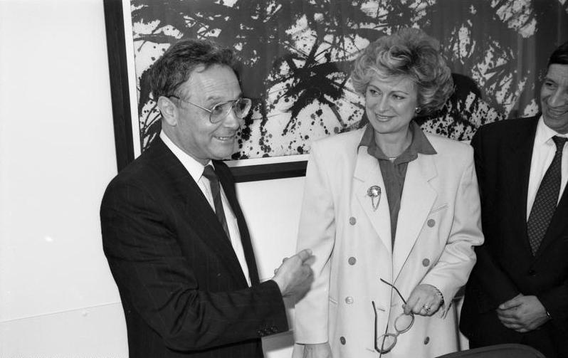 Bonn, 4.6.91 Die Parlamentarische Staatssekretärin im Bundesministerium für wirtschaftliche Zusammenarbeit, Michaela Geiger, empfing eine Regierungsdelegation aus Marokko zu einem Informationsgespräch im Bundesministerium für wirtschaftliche Zusammenarbeit.